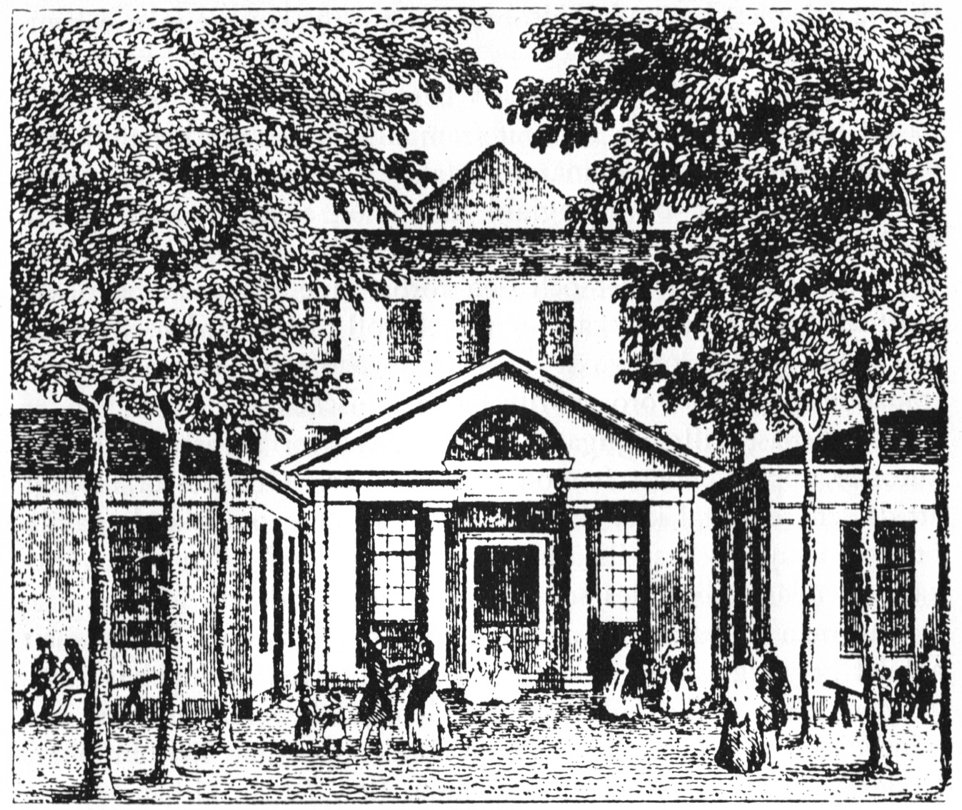 Brunnshuset vid Brunnsparken, Göteborg.